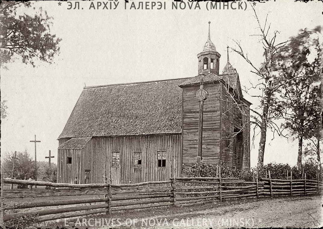 Беларуская (тарашкевіца): Прывалка (Pryvałka). Касьцёл